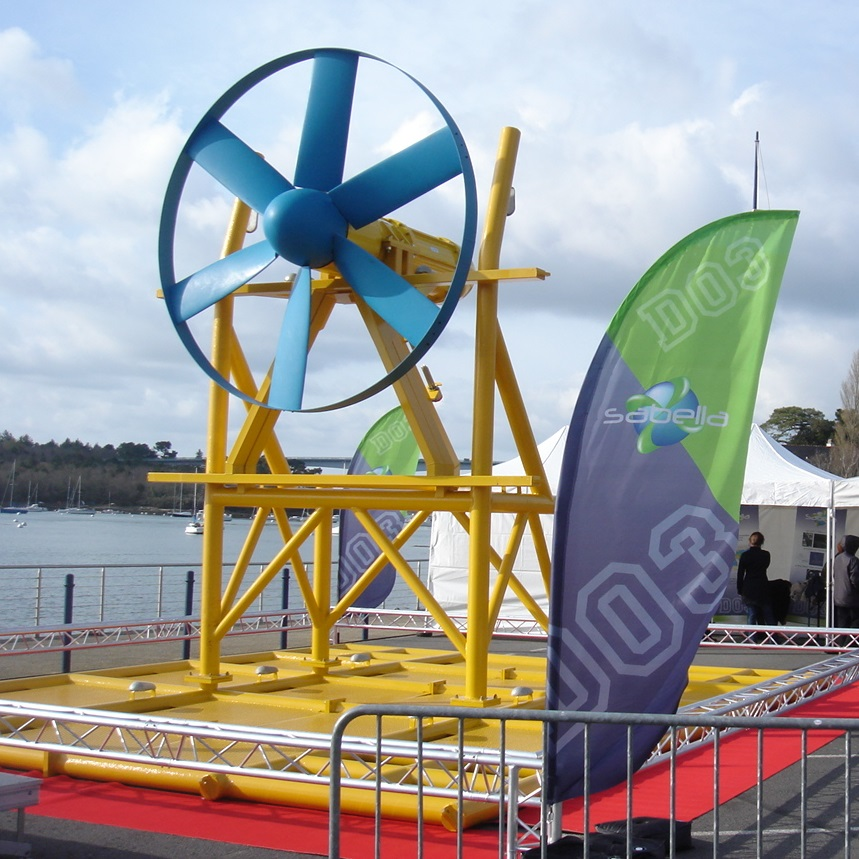 Baptême de la première hydrolienne sous-marine française, Sabella D03, en mars 2008 à Bénodet